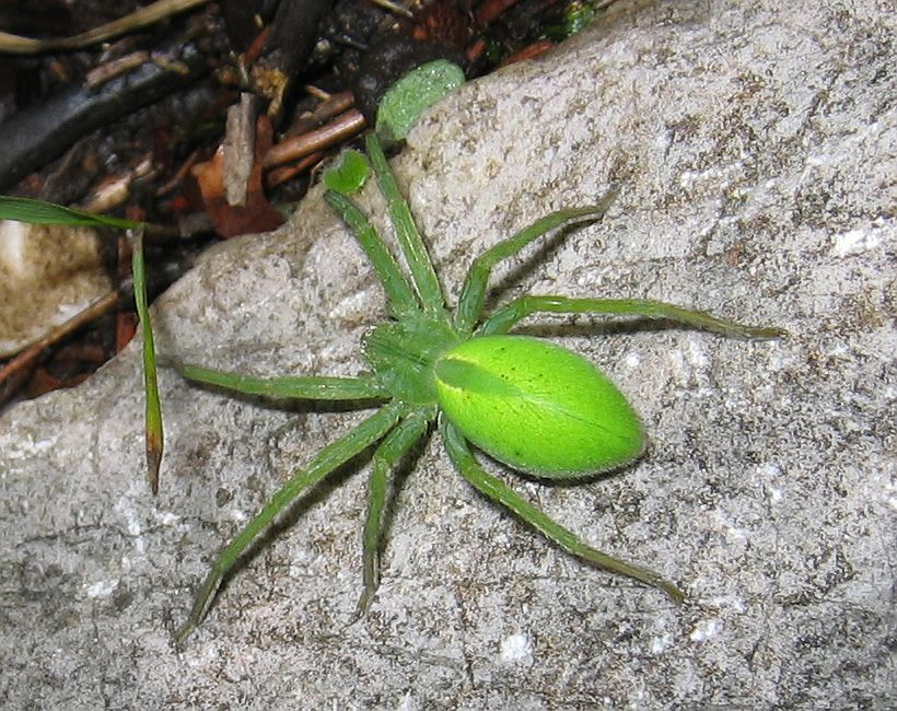 Female Micrommata virescens Großer Sonnstein, Upper Austria, Austria